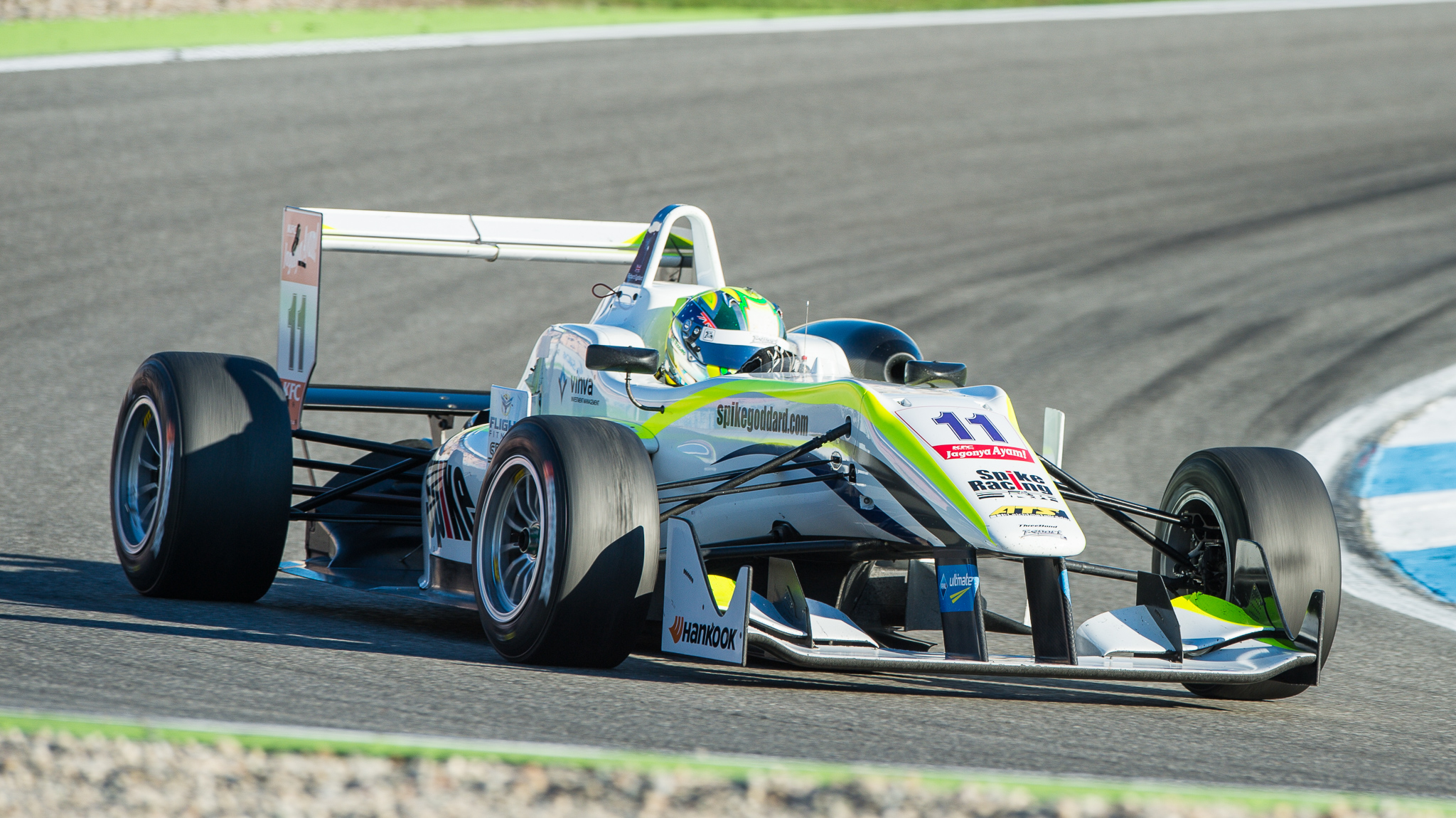 DTM,Dallara F312,Deutsche Tourenwagen Masters,F3 FIA European Championship,FIA Formel 3 Europameisterschaft,Hockenheimring,Motorsport,NBE,Neil Brown Engineering,Richard Goddard,Spike Goddard,ThreeBond with T-Sport